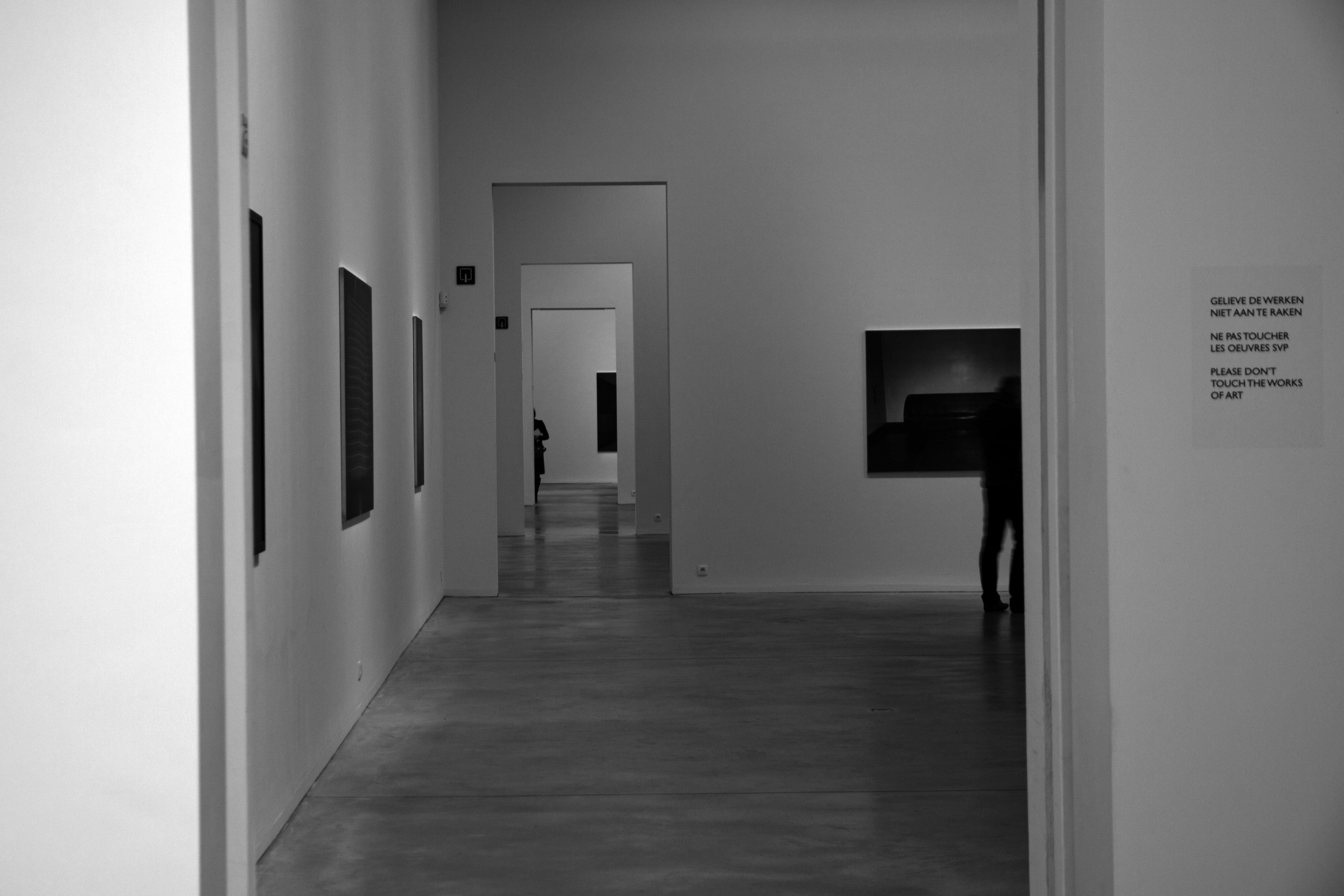 Binnen in het museum.